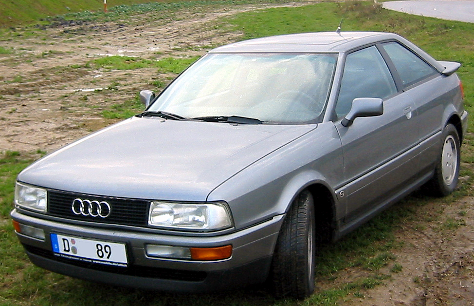 Bildbeschreibung: Audi Coupé Typ 89 von vorne Ort: Nähe Braunkohletagebau Garzweiler Fotograf/Zeichner: joschi71 (Benutzer:joschi71, eigenes Foto) Datum: September 2005 andere Versionen: keine